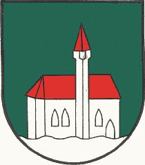 Wappen der Marktgemeinde Weißkirchen in Steiermark (bis Ende 2014)